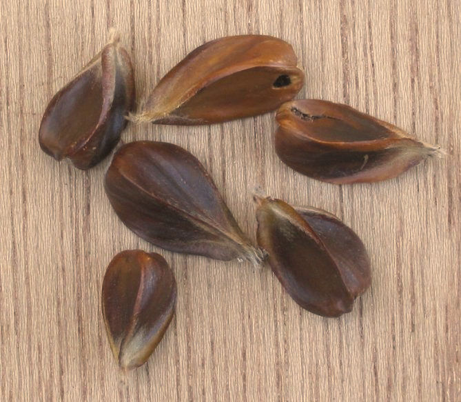 zelfgemaakte foto van beukenootjes; half september